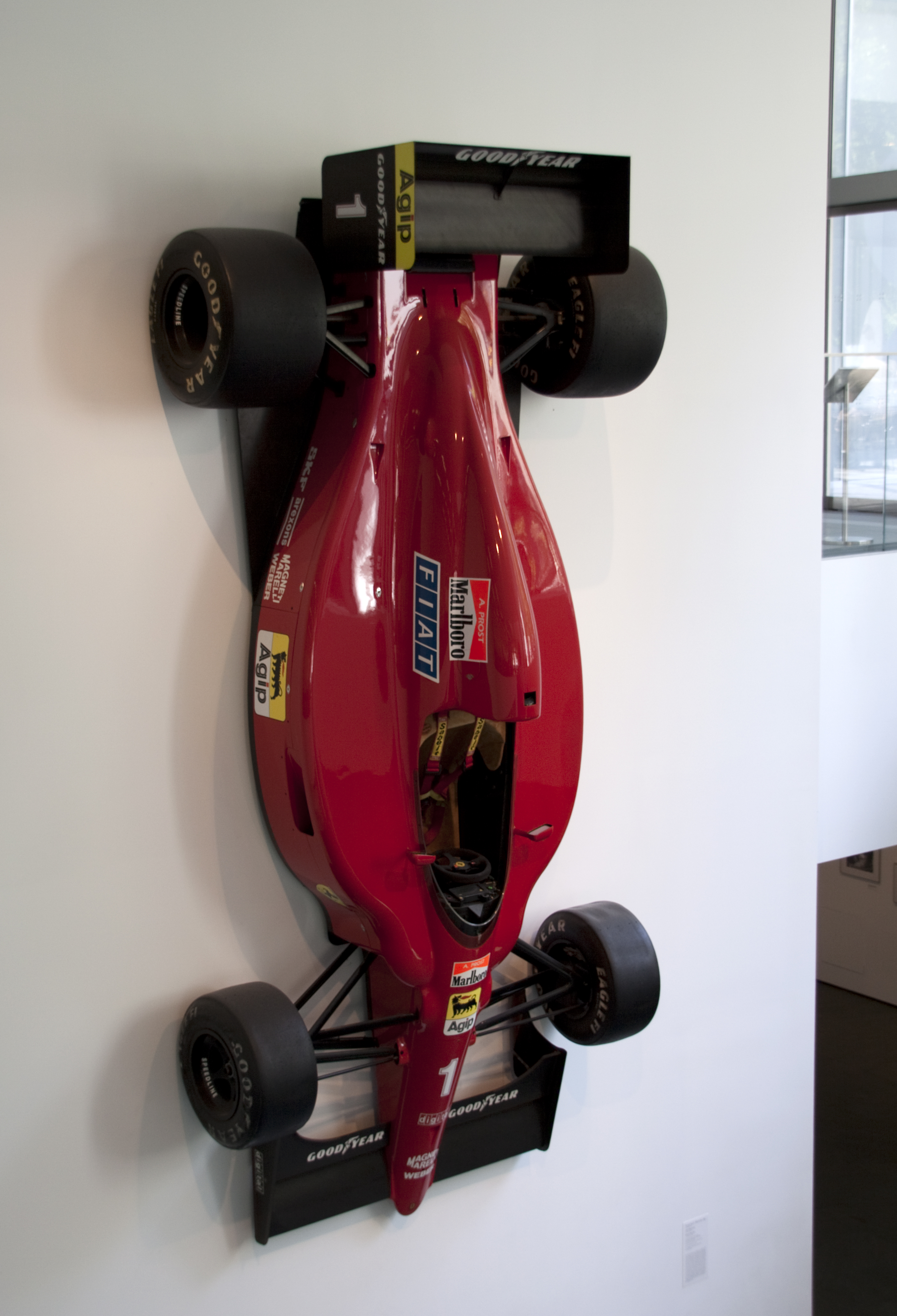 Ferrari F1 moma